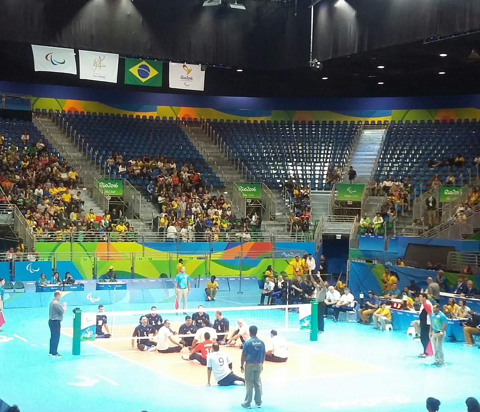 Iniciando a partida da semifinal do voleibol sentado Egito x Bósnia em 16 de Setembro Rio 2016.